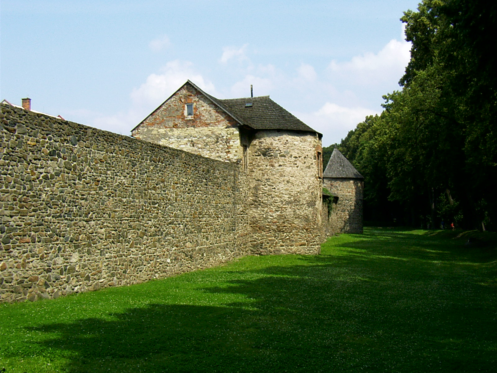 Polička: Stadtmauer